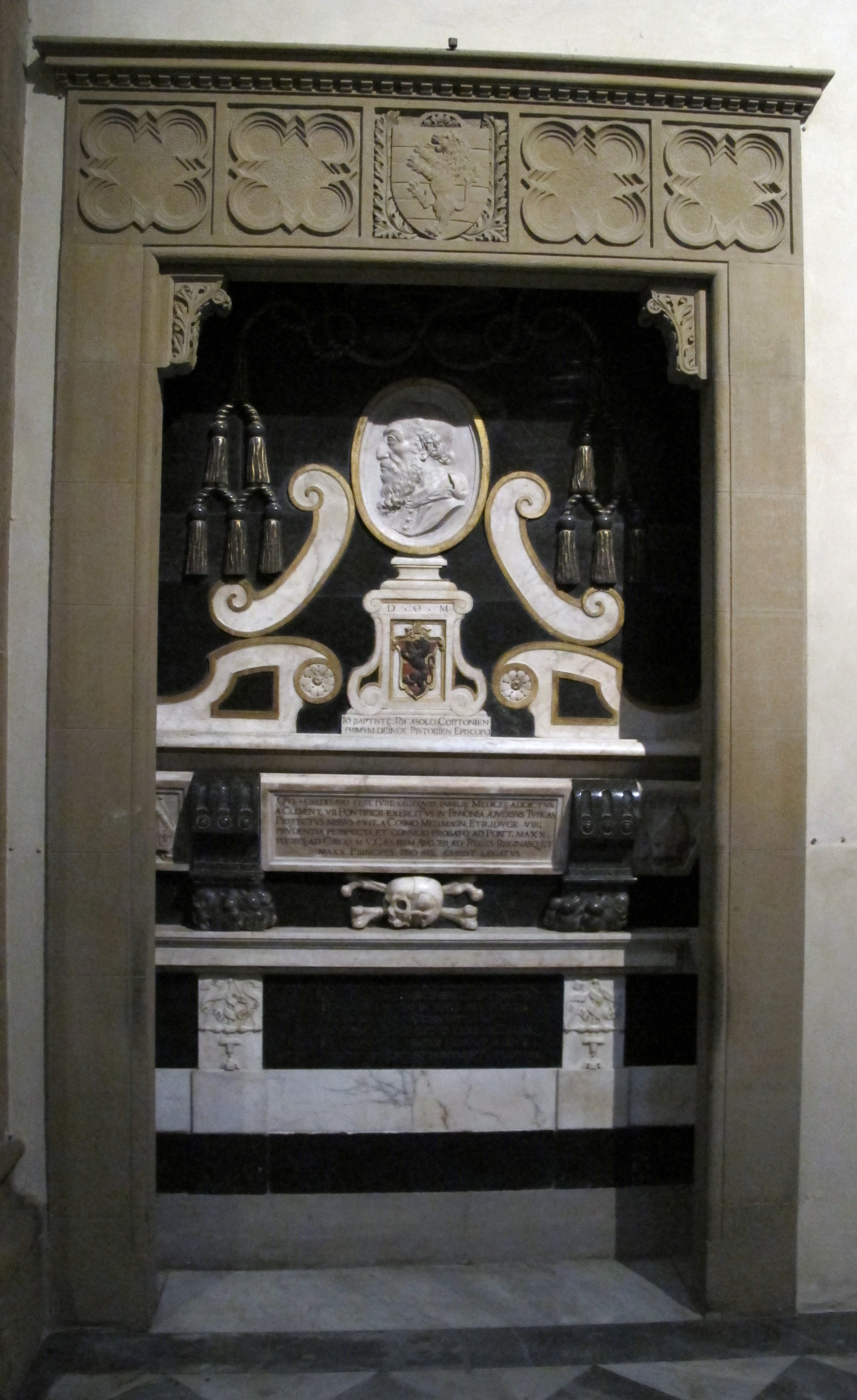 Smn, navata dx, romolo del tadda, monumento a g.b. ricasoli, vescovo di pistoia e cortona, 1592-1595